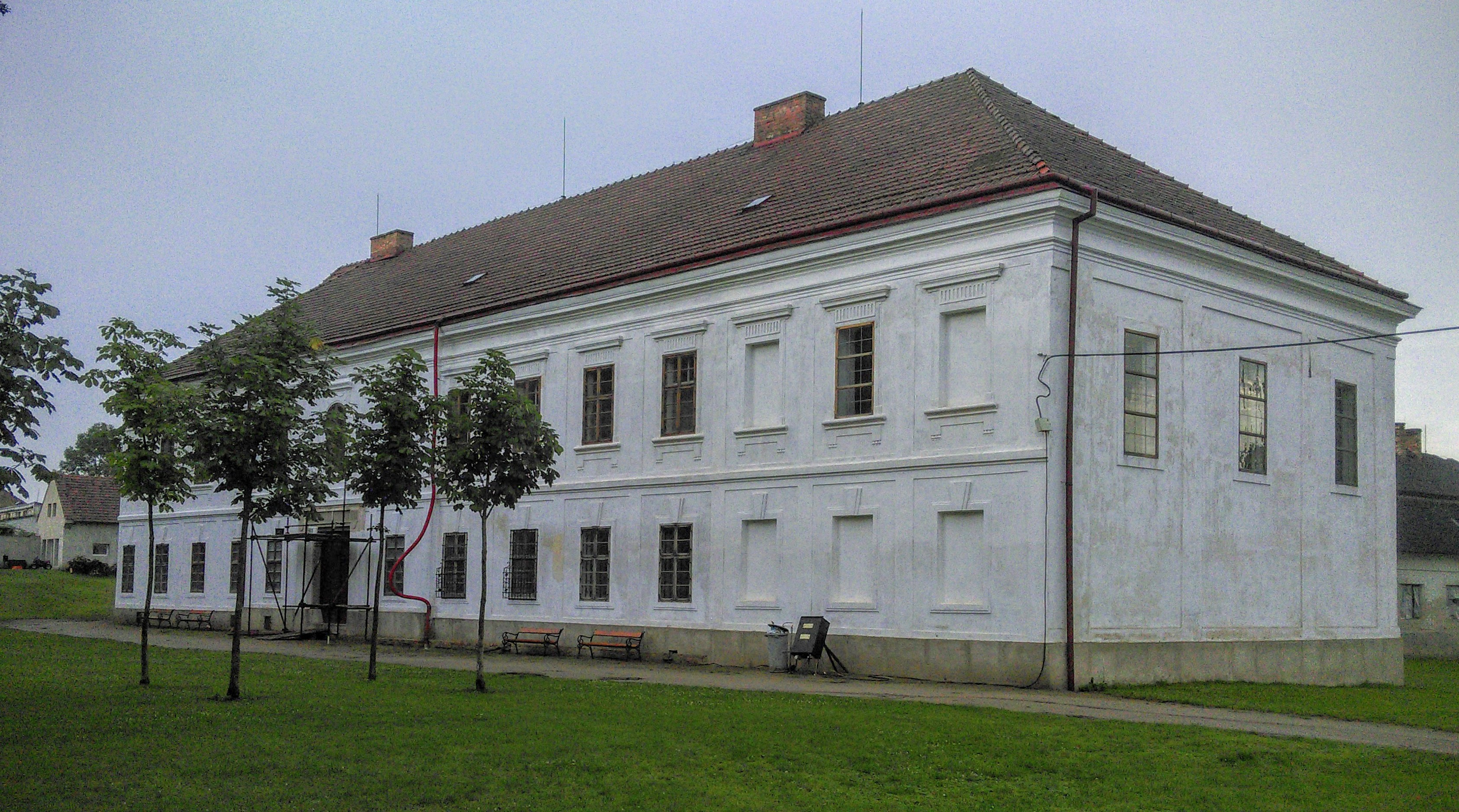 Zámek Uhřice